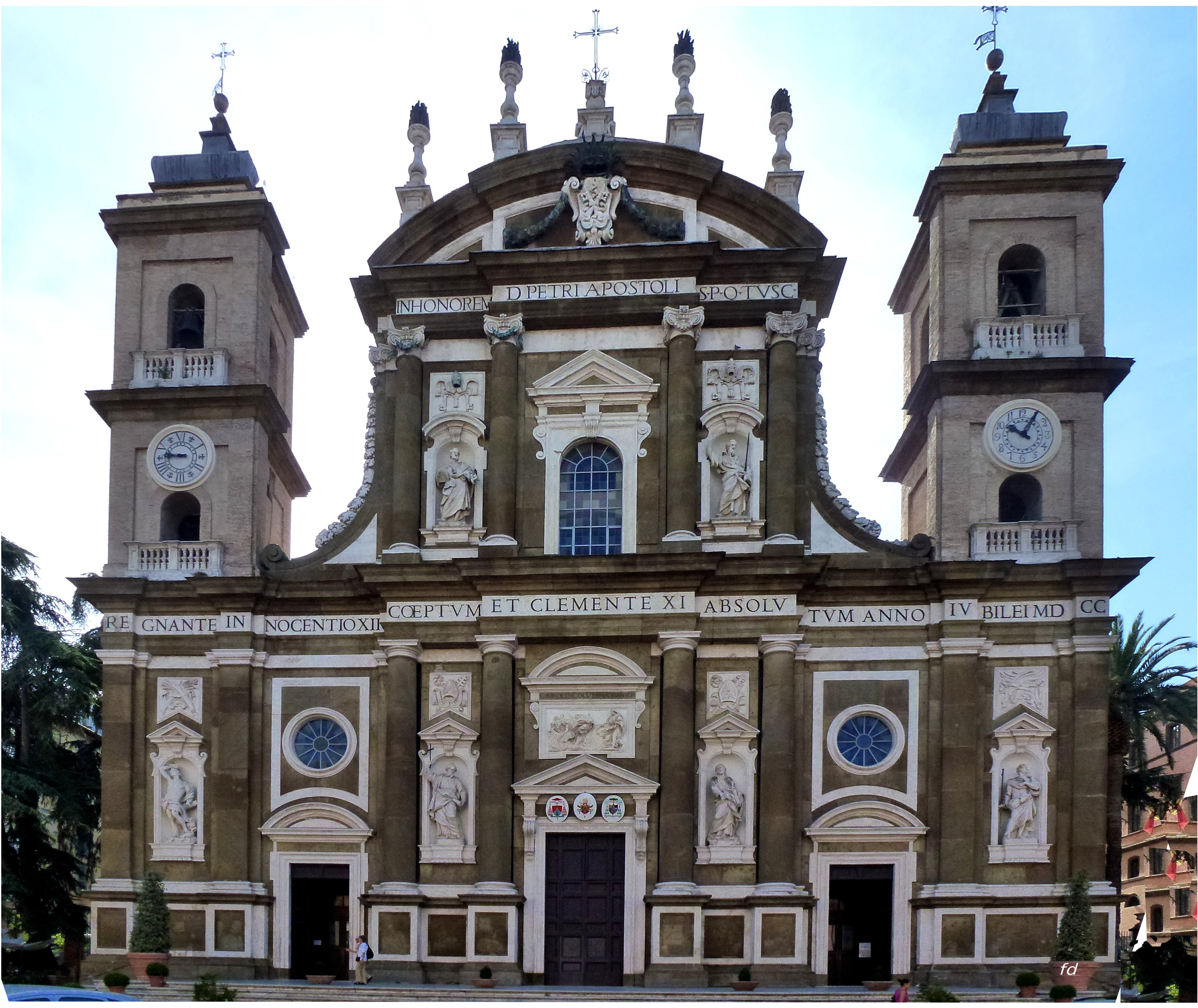 San Pietro Apostolo in Frascati